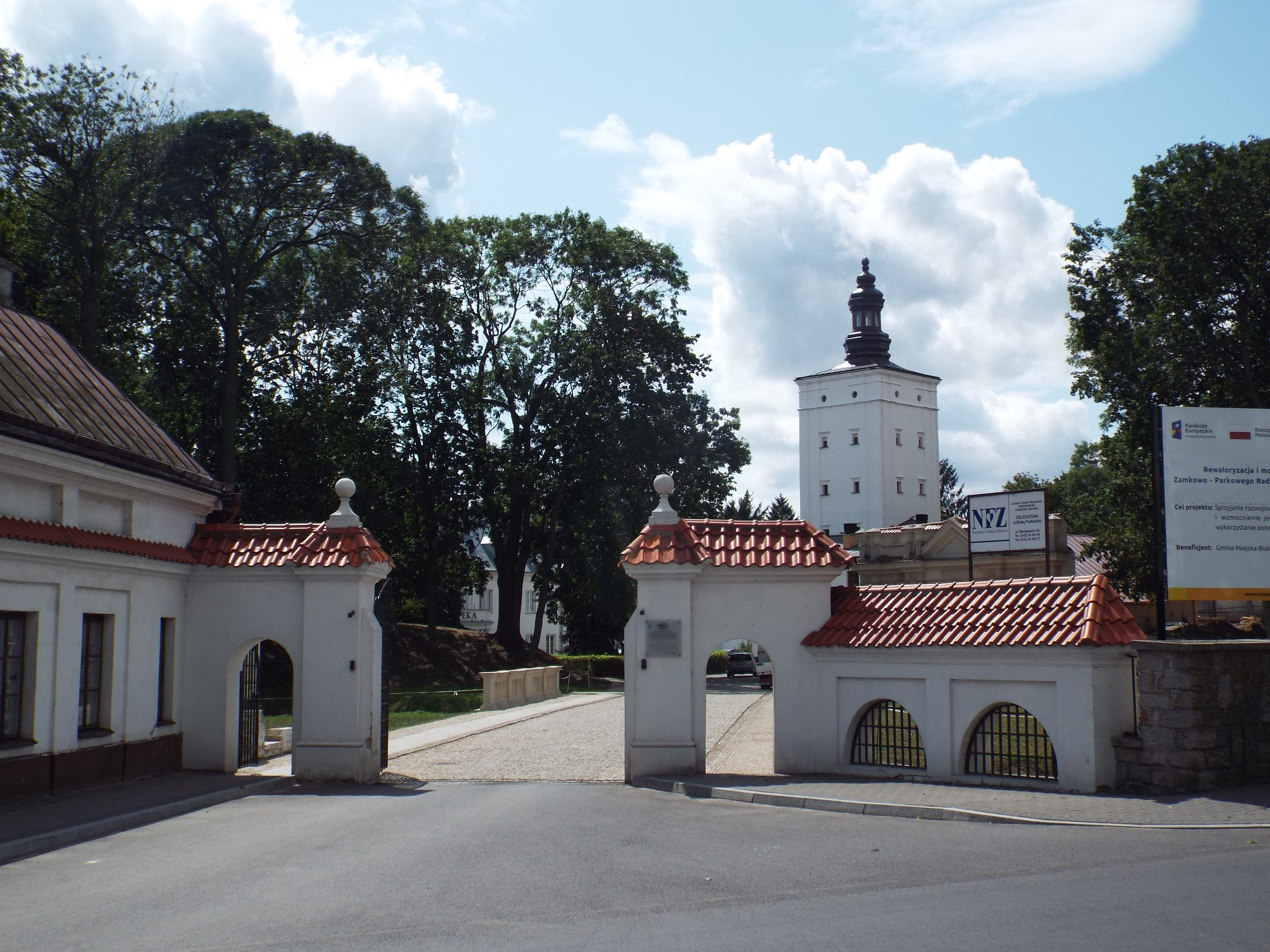 Biała Podlaska – zespół pałacu Radziwiłłów